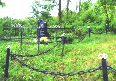 Могила Ефима Исааковича Рутмана, который изготовил и установил в 1954 году памятник на братской могиле евреев Лукомля, убитых во время Холокоста. По его завещанию похоронен рядом с памятником.